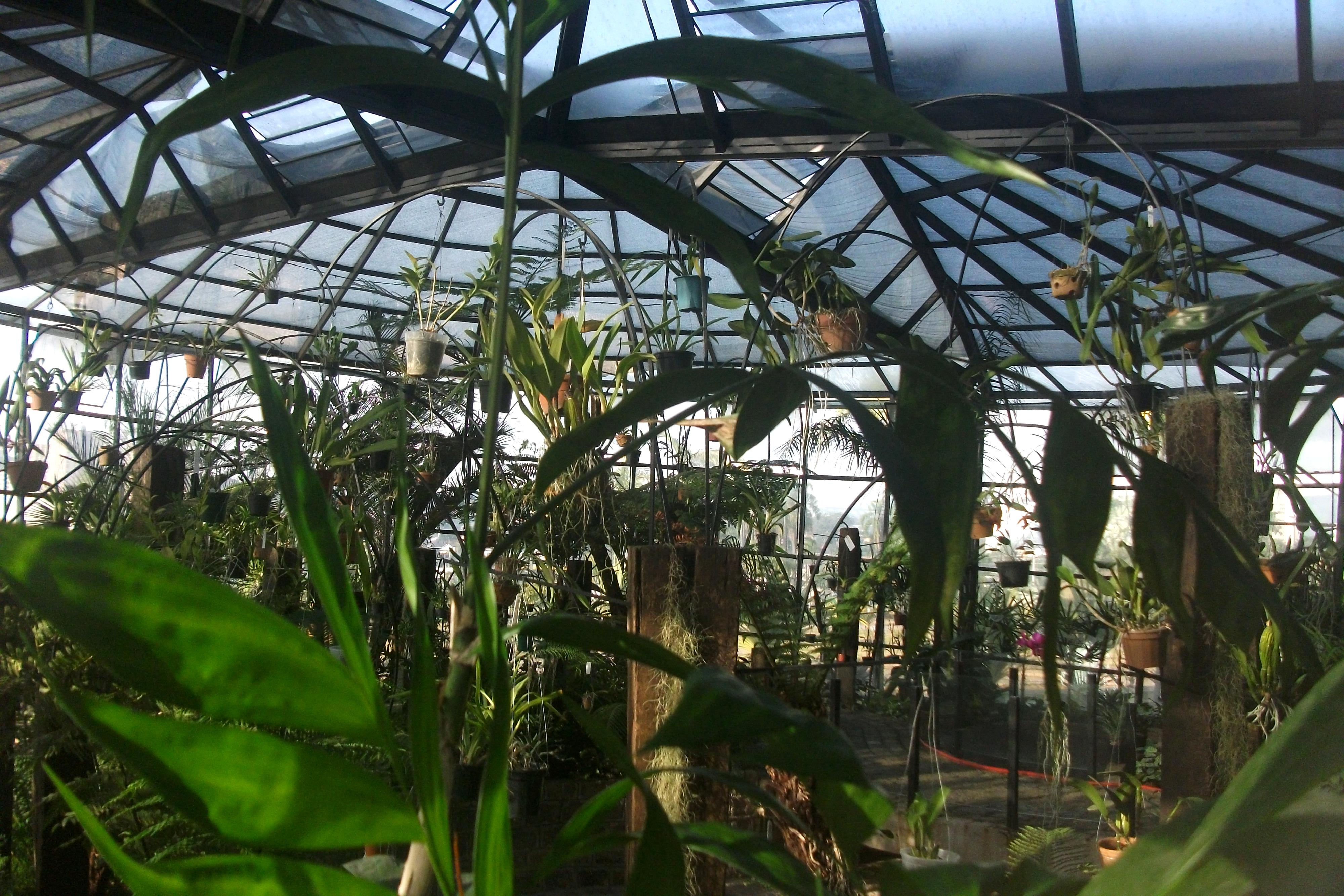 Orquidário.